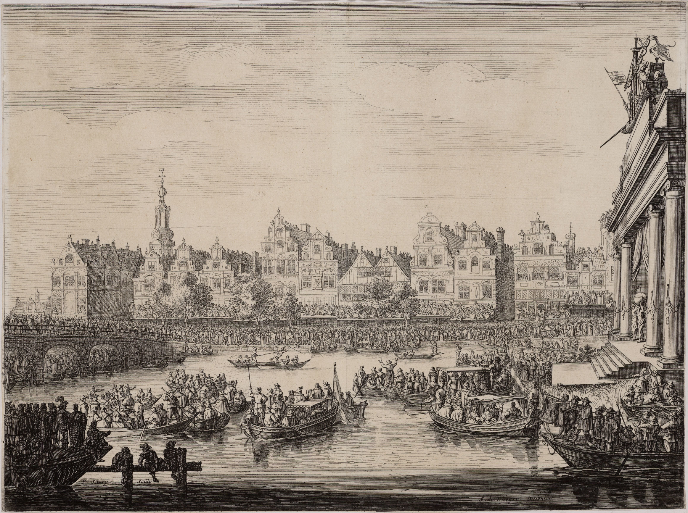 Feestelijkheden op het water n.a.v. het bezoek van Maria de Medici aan Amsterdam